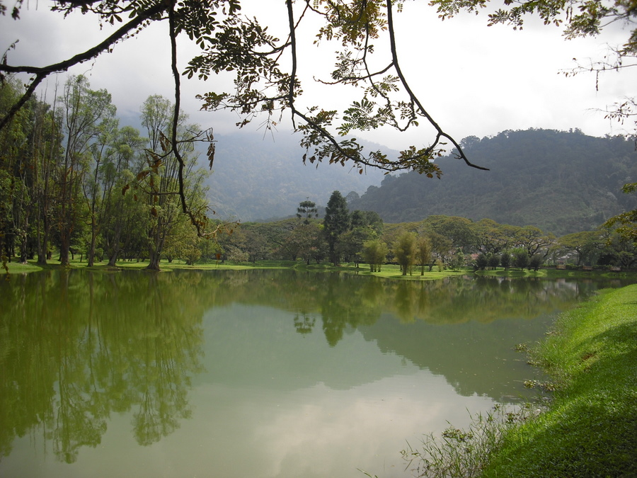 Malaysia, Perak, Taiping Lake Gardens.